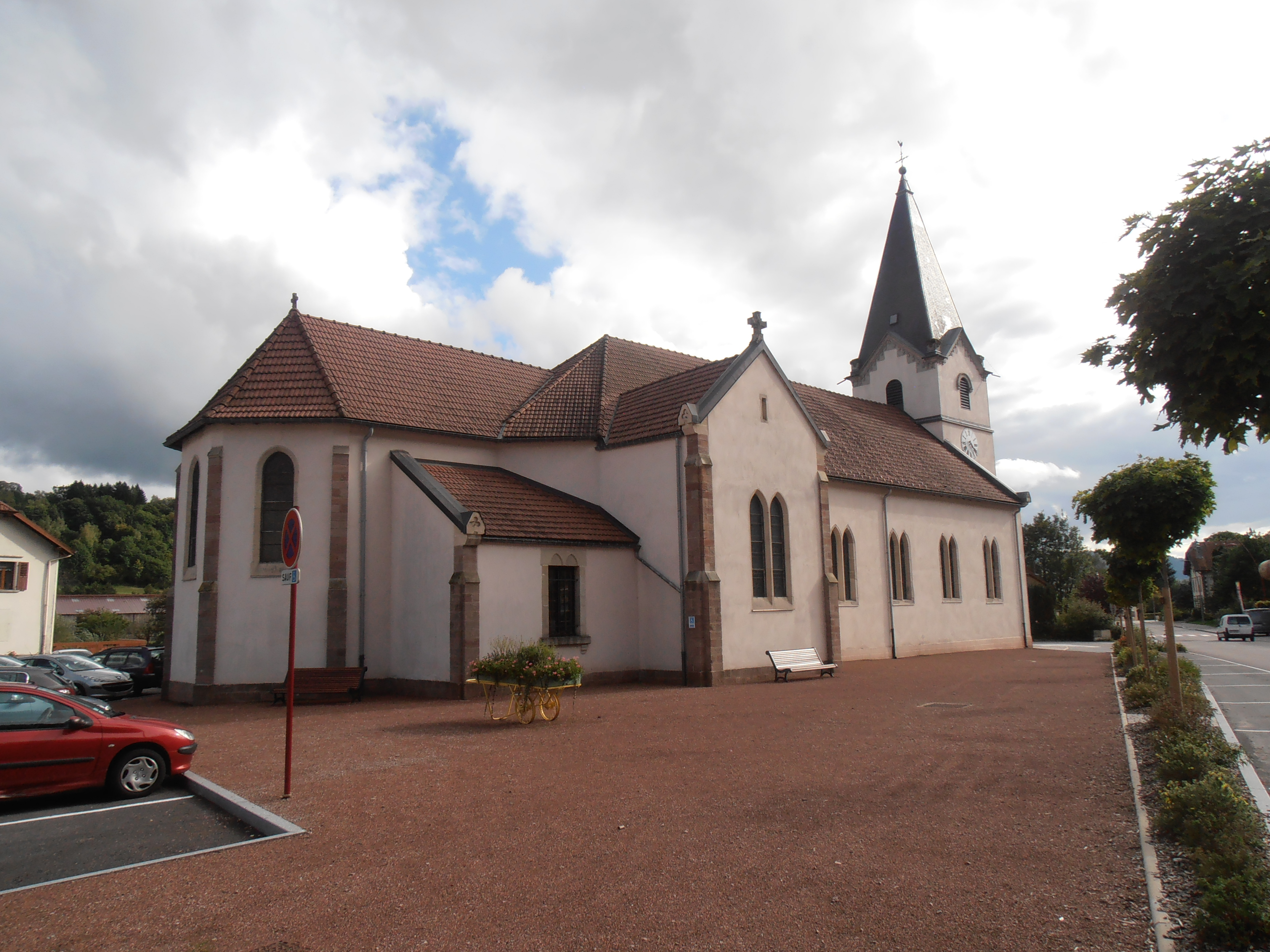 Vosges, Le Ménil, Église Saint-Blaise, construite en 1733 et remaniée au cours du XIXe et son orgue de Jean-Nicolas Jeanpierre, transformé en 1871 par Henri Didier